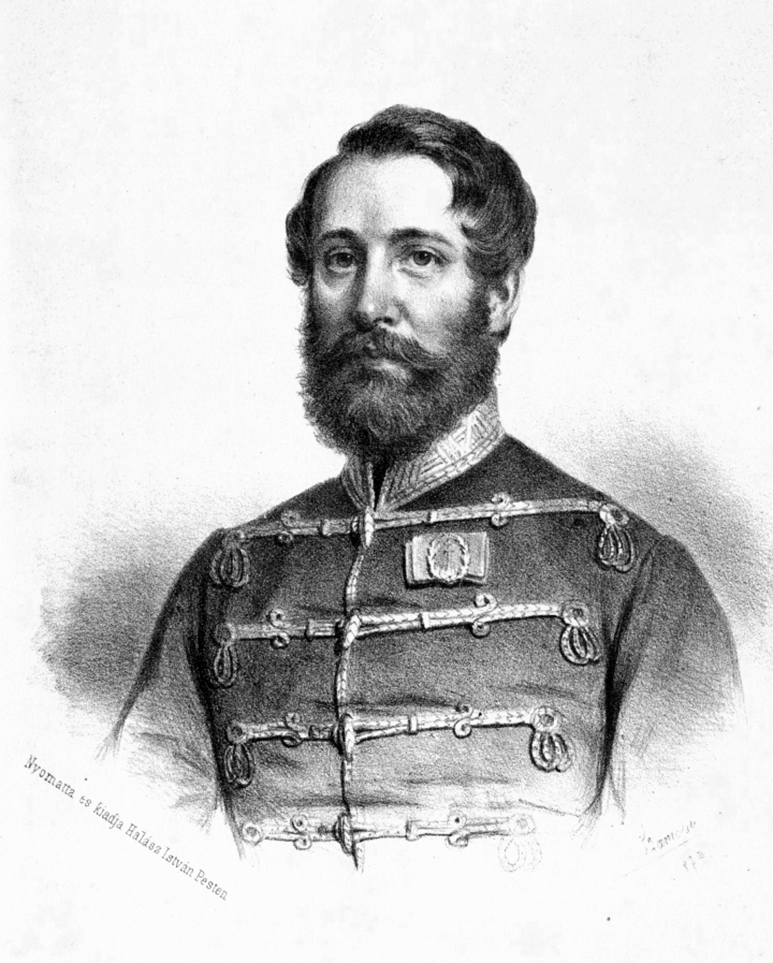 Leiningen-Westerburg Károly honvéd vezérőrnagy, aradi vértanú